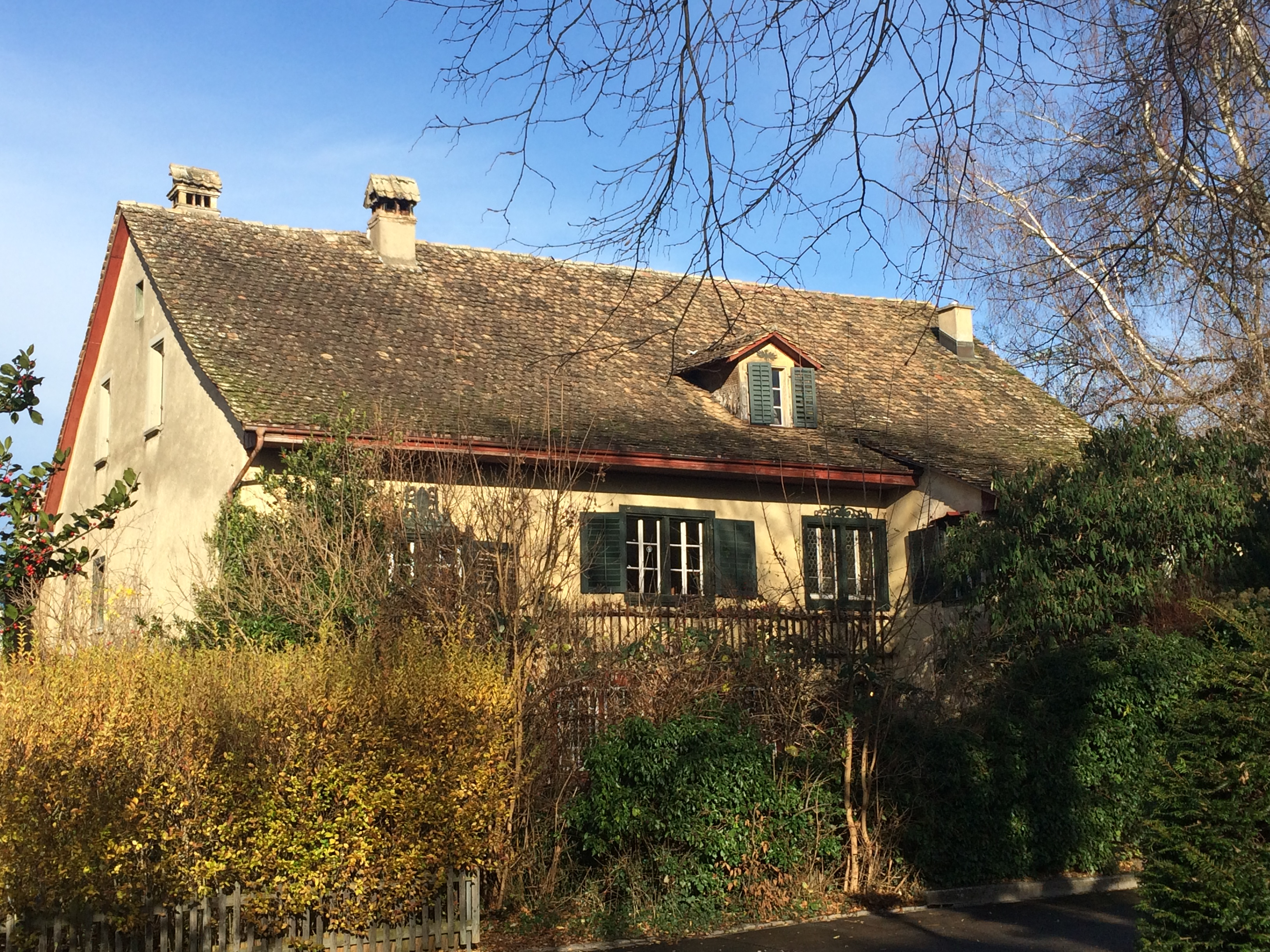 Haus an der Hinter Zünen, Zollikon